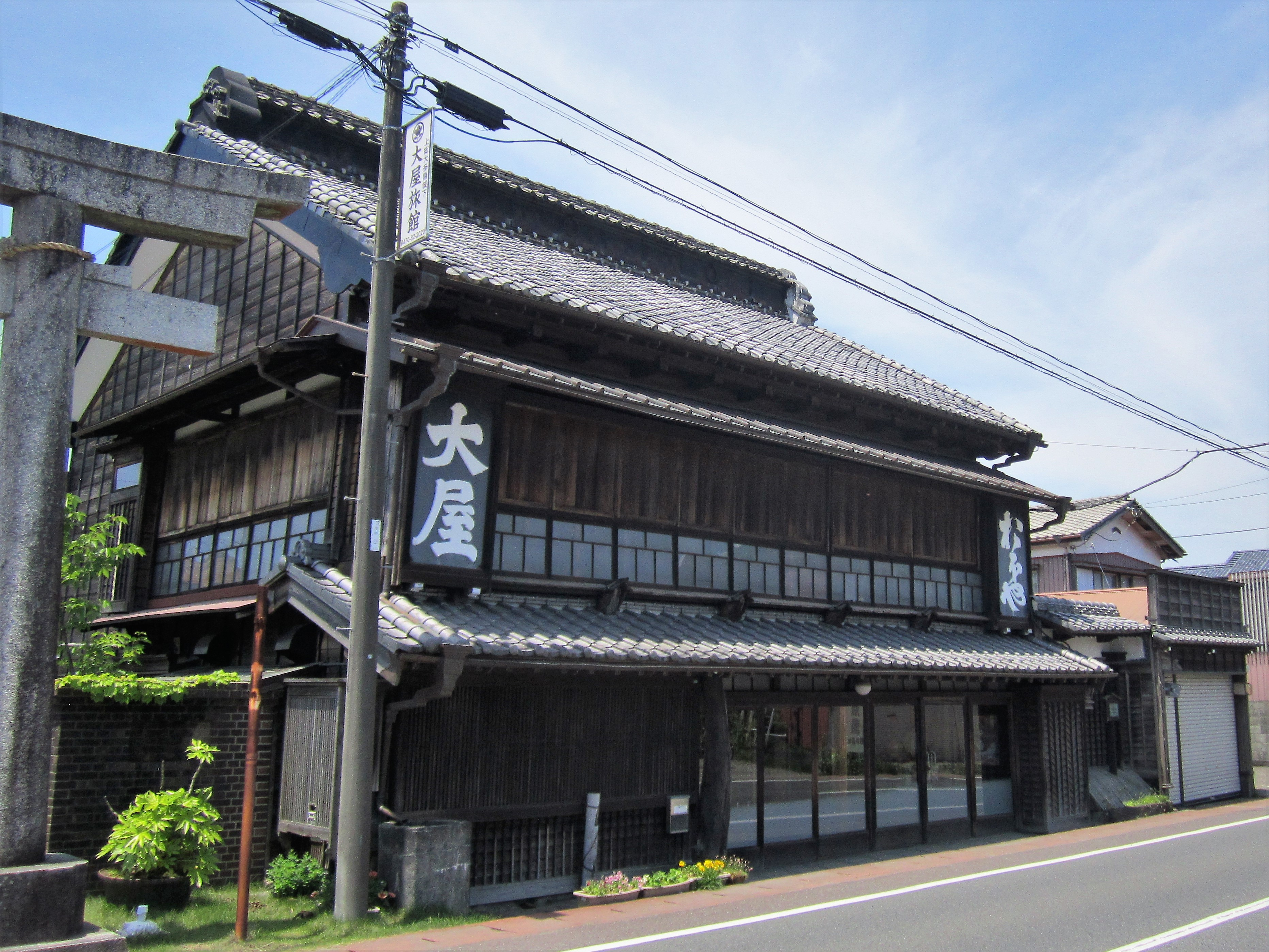 大屋旅館（大多喜町新丁） Canon PowerShot A2200